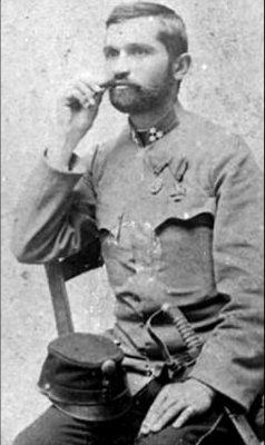 Bahily János (Ján Bahýľ 1856–1916) szlovák feltaláló, aki 1895. augusztus 13-i dátummal kapott szabadalmat Ferenc József császártól helikopter-rendszerı találmányára, amelyet 3392-es szám alatt iktatott a szabadalmi hivatal.